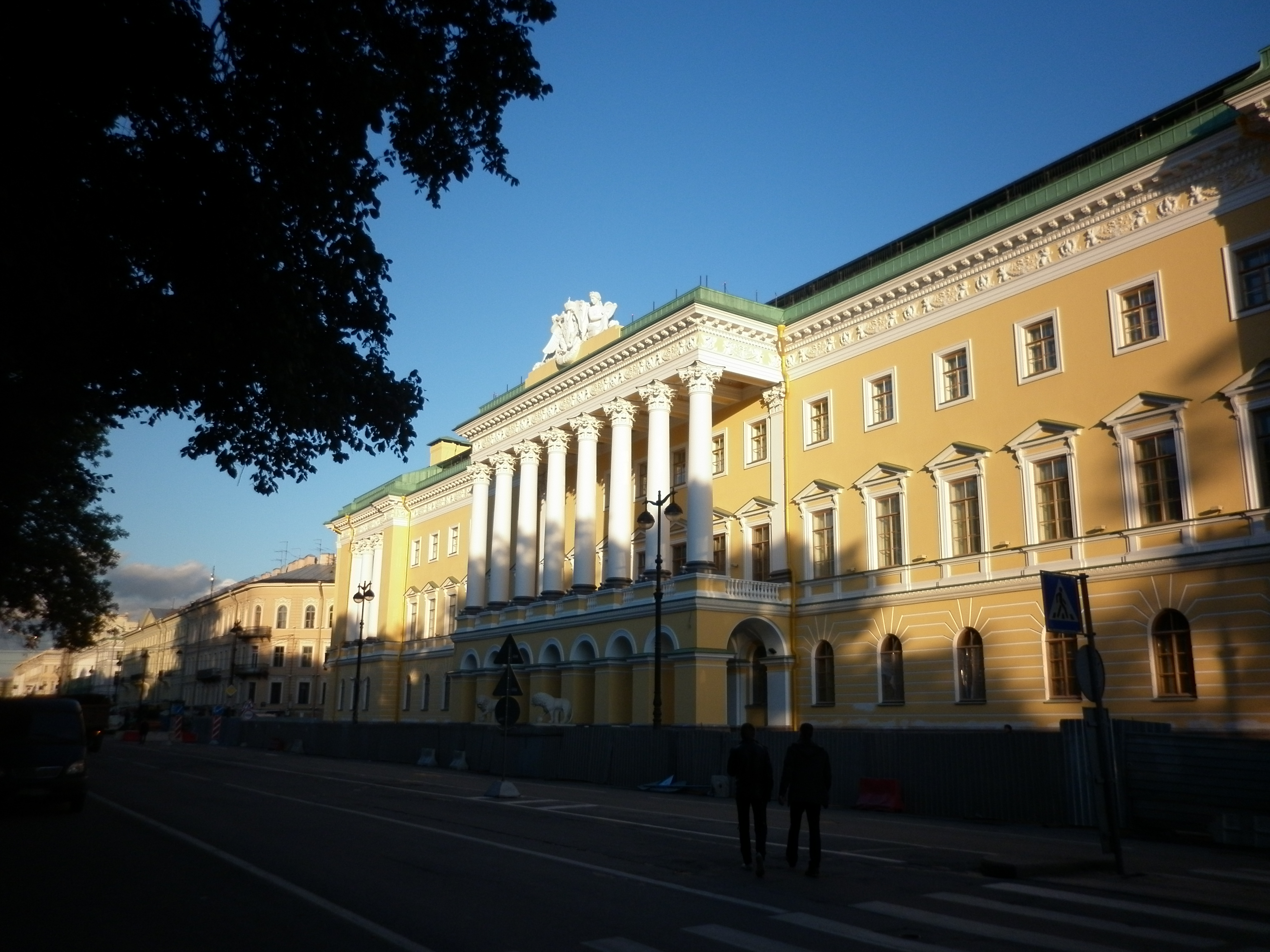 Дом князя Лобанова-Ростовского А. Я. Лобанова-Ростовского - Здание Военного министерста 1817-1820 гг. - арх. О. Монферран